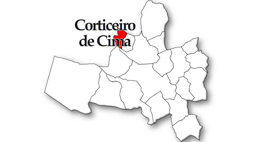 Português